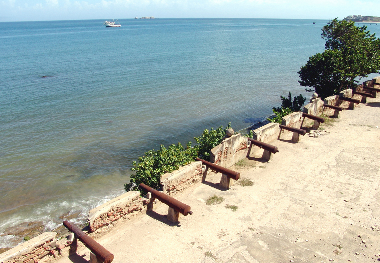 Playa Pampatar, Margarita, Nueva Esparta, Venezuela